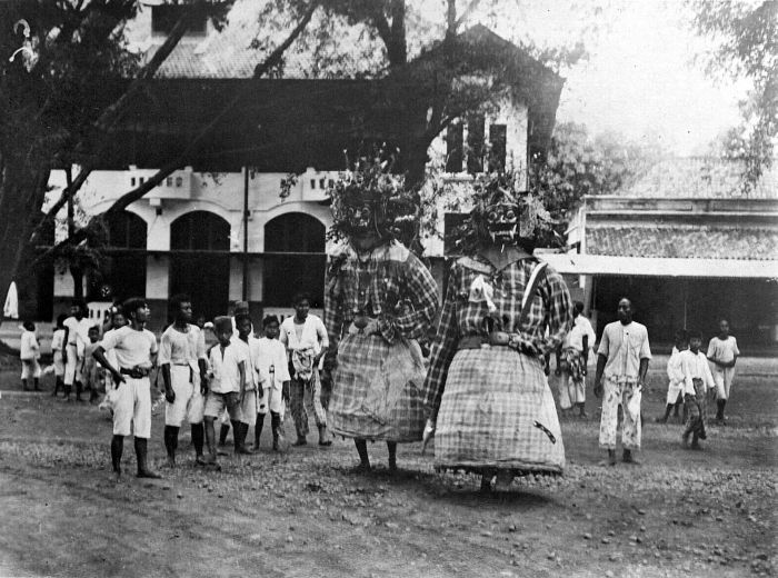 Repronegatief. Reuzenpoppen, Ondel-ondel sieren de straat tijdens het religieuze feest 'selamatan' ter gelegenheid van de inwijding van de nieuwe vleugel van Hotel des Indes, Java